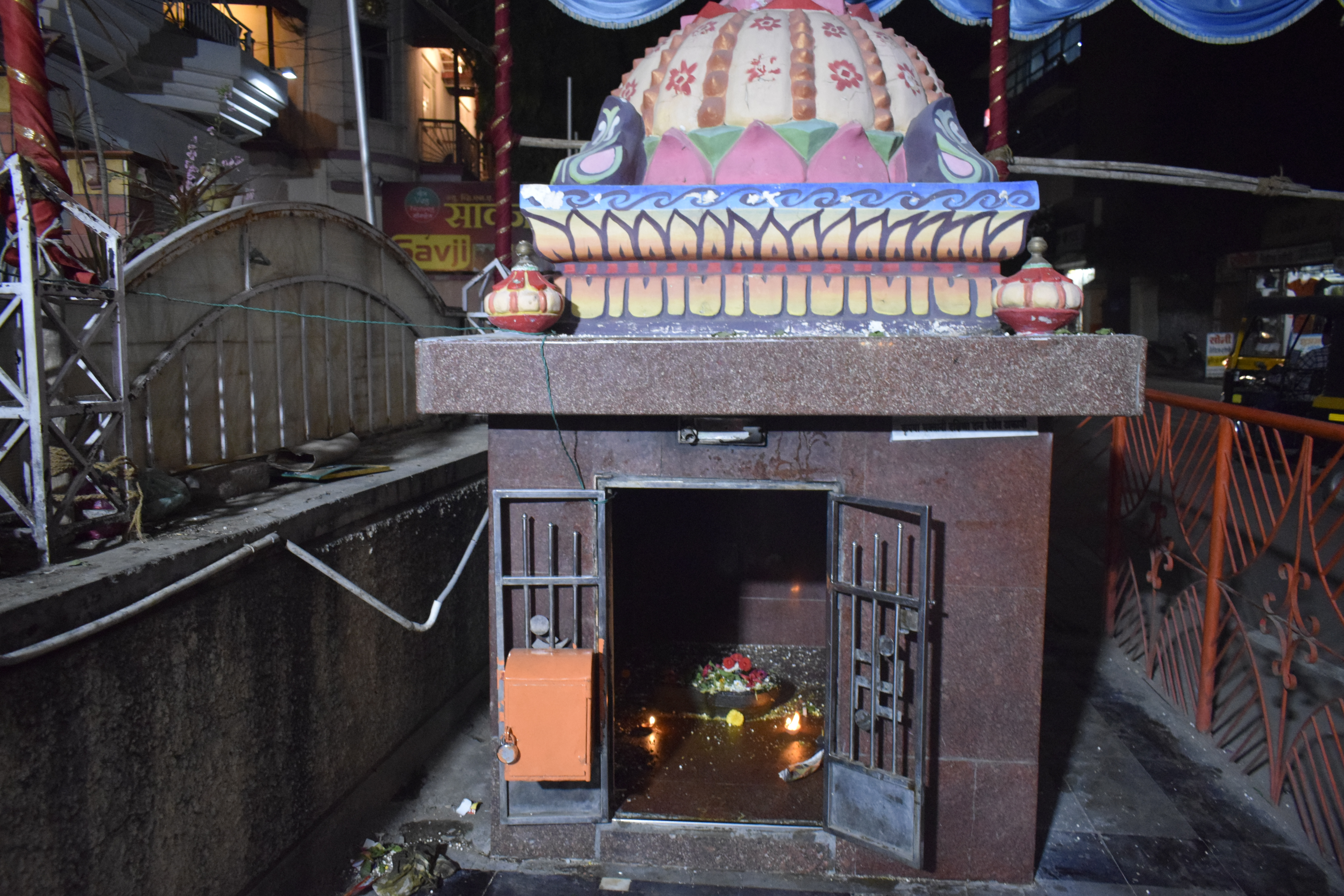 श्री ब्रह्मेश्वर लिंग